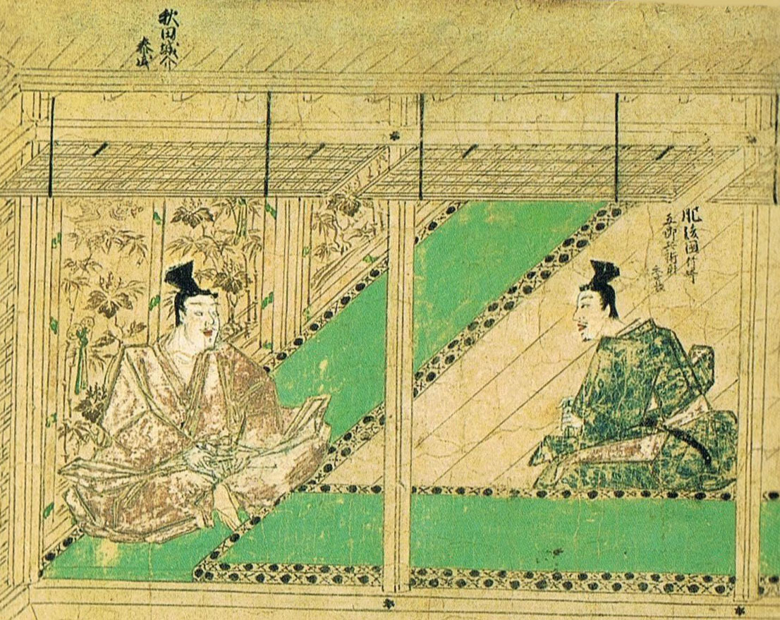 『蒙古襲来絵詞』前巻、絵九。文永の役後、九州から鎌倉へ上った竹崎季長が、安達氏甘縄邸で御恩奉行の安達泰盛に「先駆けの功」を訴える場面。